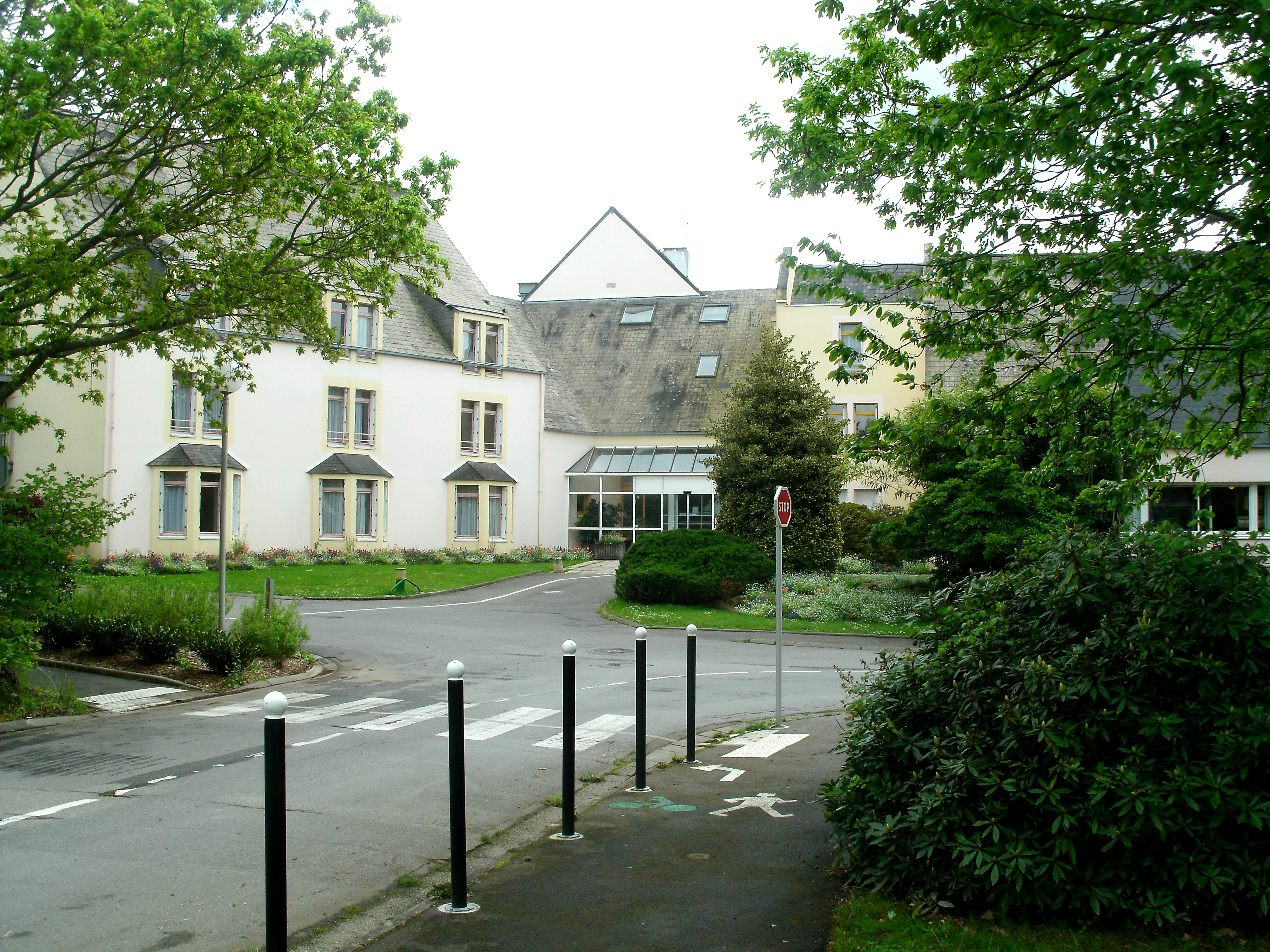 Entrée de l'EHPAD du Marégo